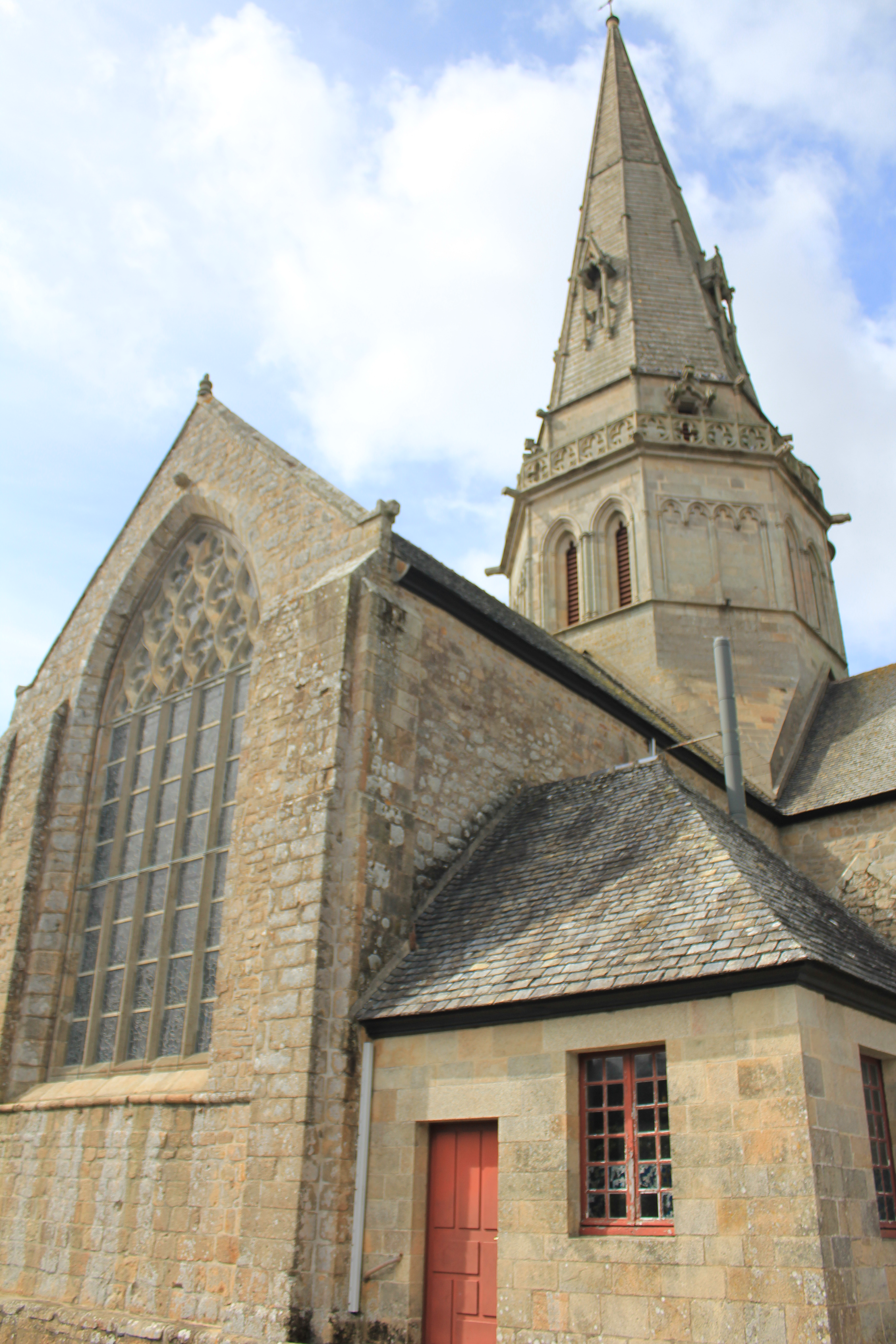 Église Notre-Dame-de-Joie de Merlevenez, France. Chevet et sacristie. .